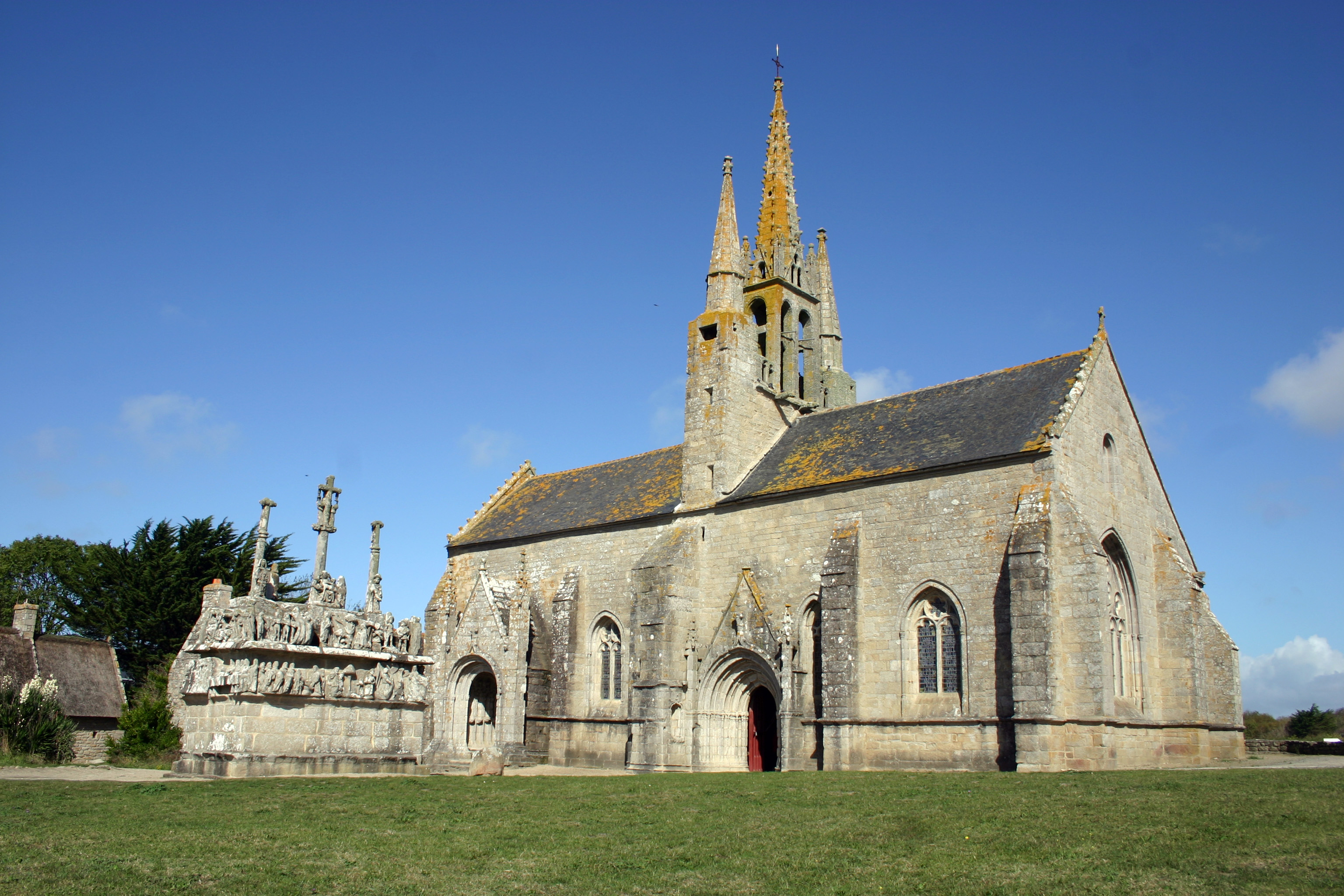 Chapelle et Calvaire de Notre-Dame de Tronoën-Saint-Jean-Trolimon-Finistère-Bretagne-France .